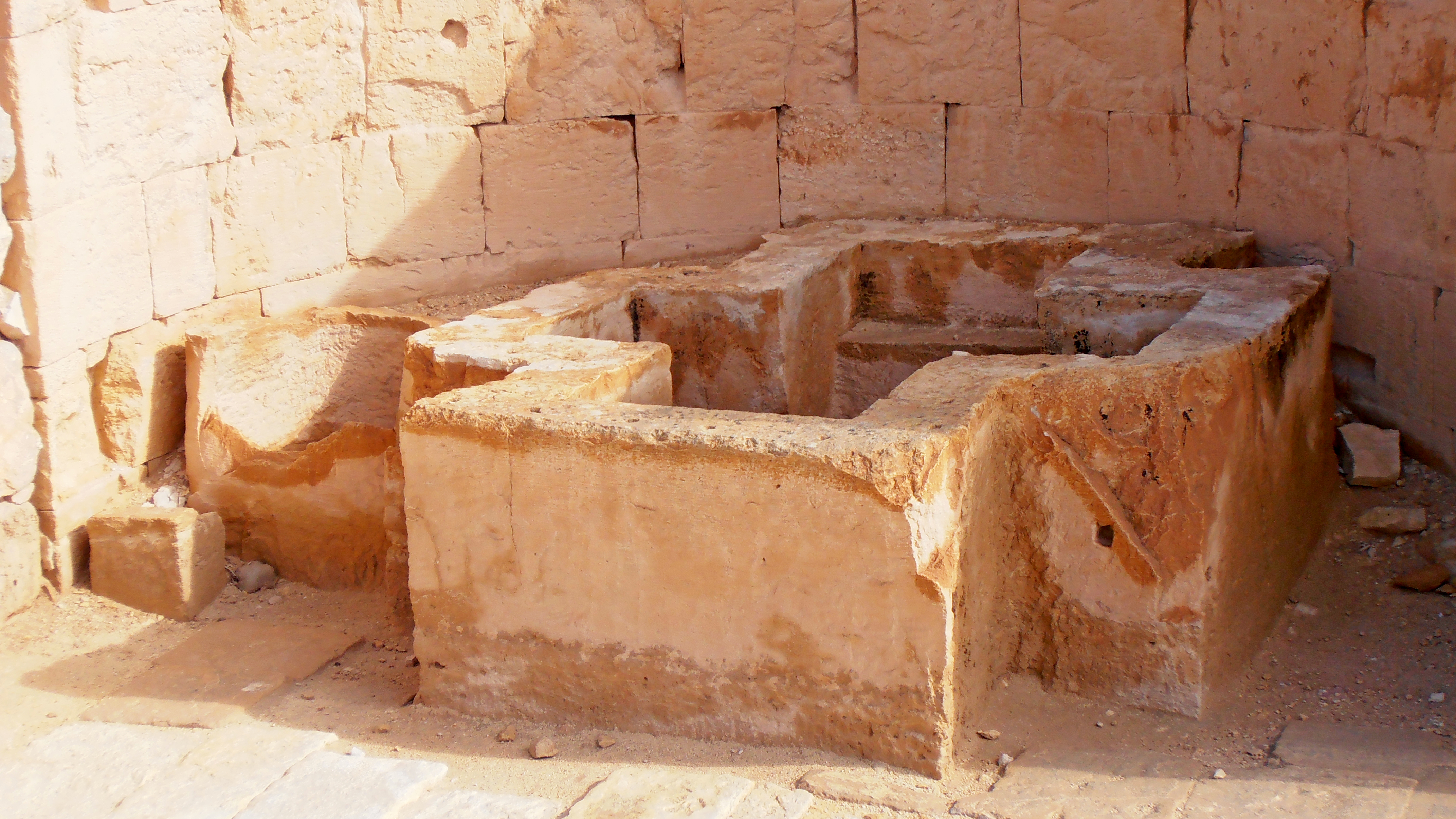 Baptisterium; The Southern Church, Shivta, Negev, Israel אגן טבילה; הכנסיה הדרומית, שבטה, רמת הנגב